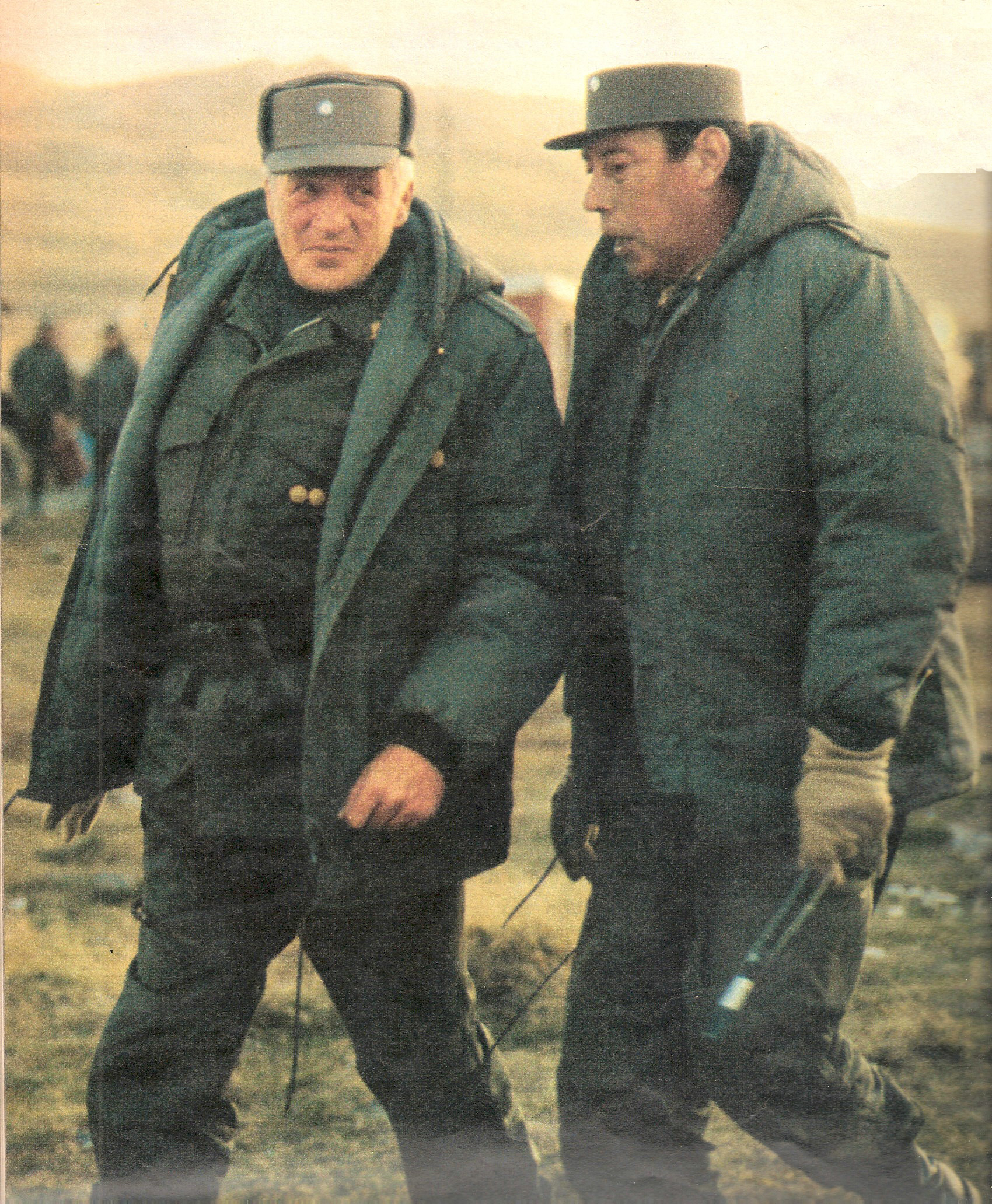 Galtieri(presidente de Facto) y el general Oscar Luis Jofre en 1982. Visita de Galtieri a las islas el 22/04/1982.